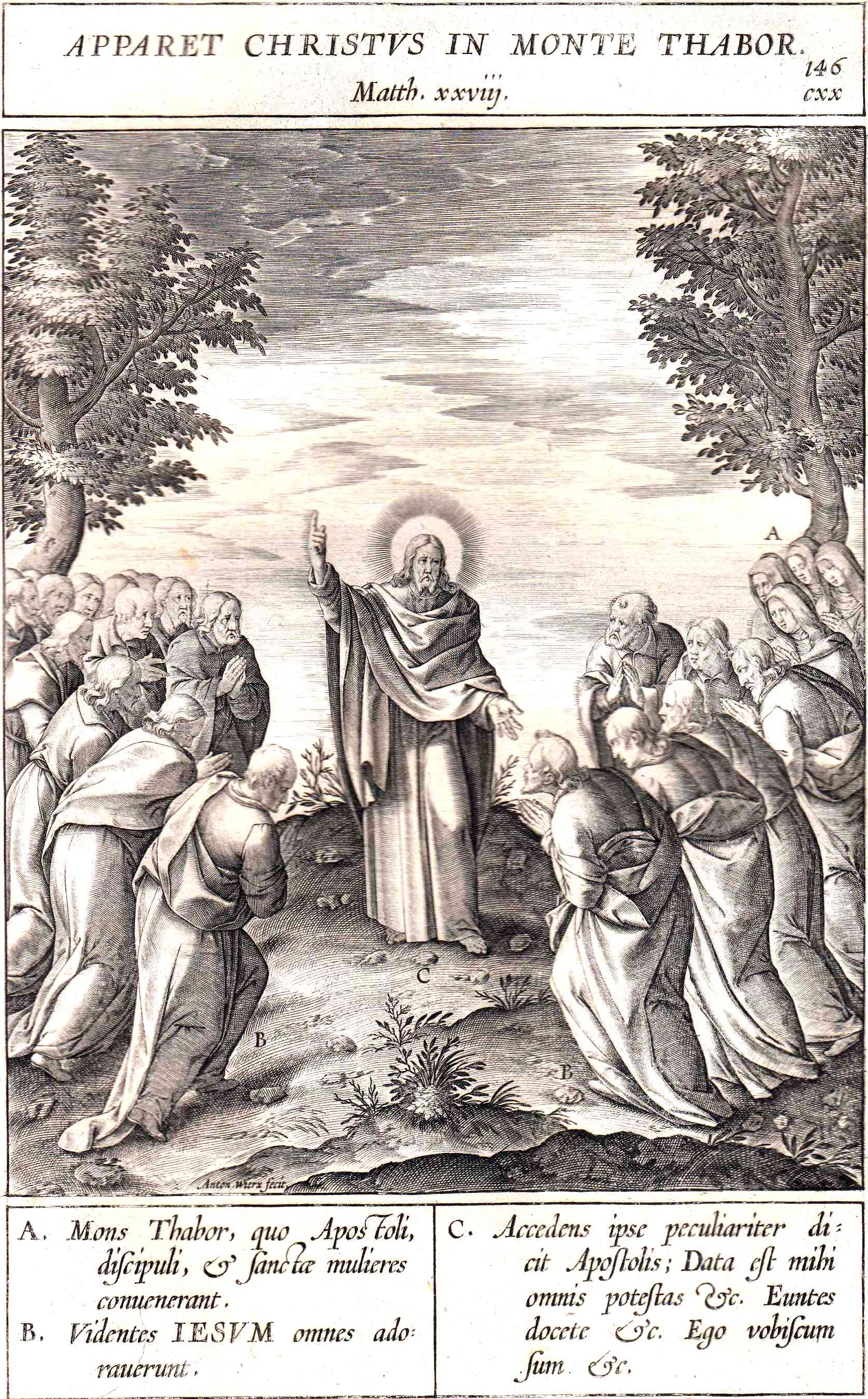 Гравюра Wierix Antony II сюжет "Apparet Christvs in Monte Thabor.jpg" 1593 год.